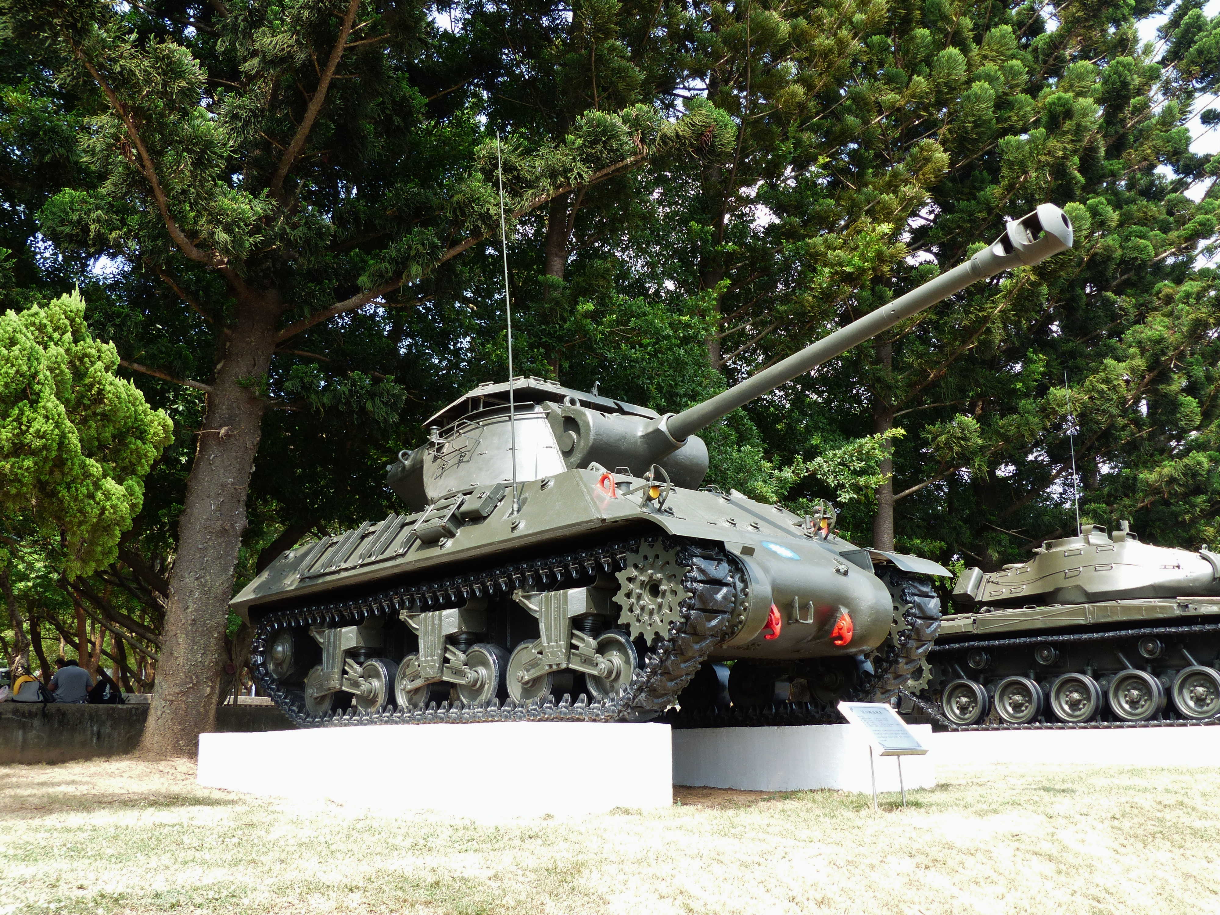 成功嶺介壽臺側陳列的M36驅逐戰車右前方。